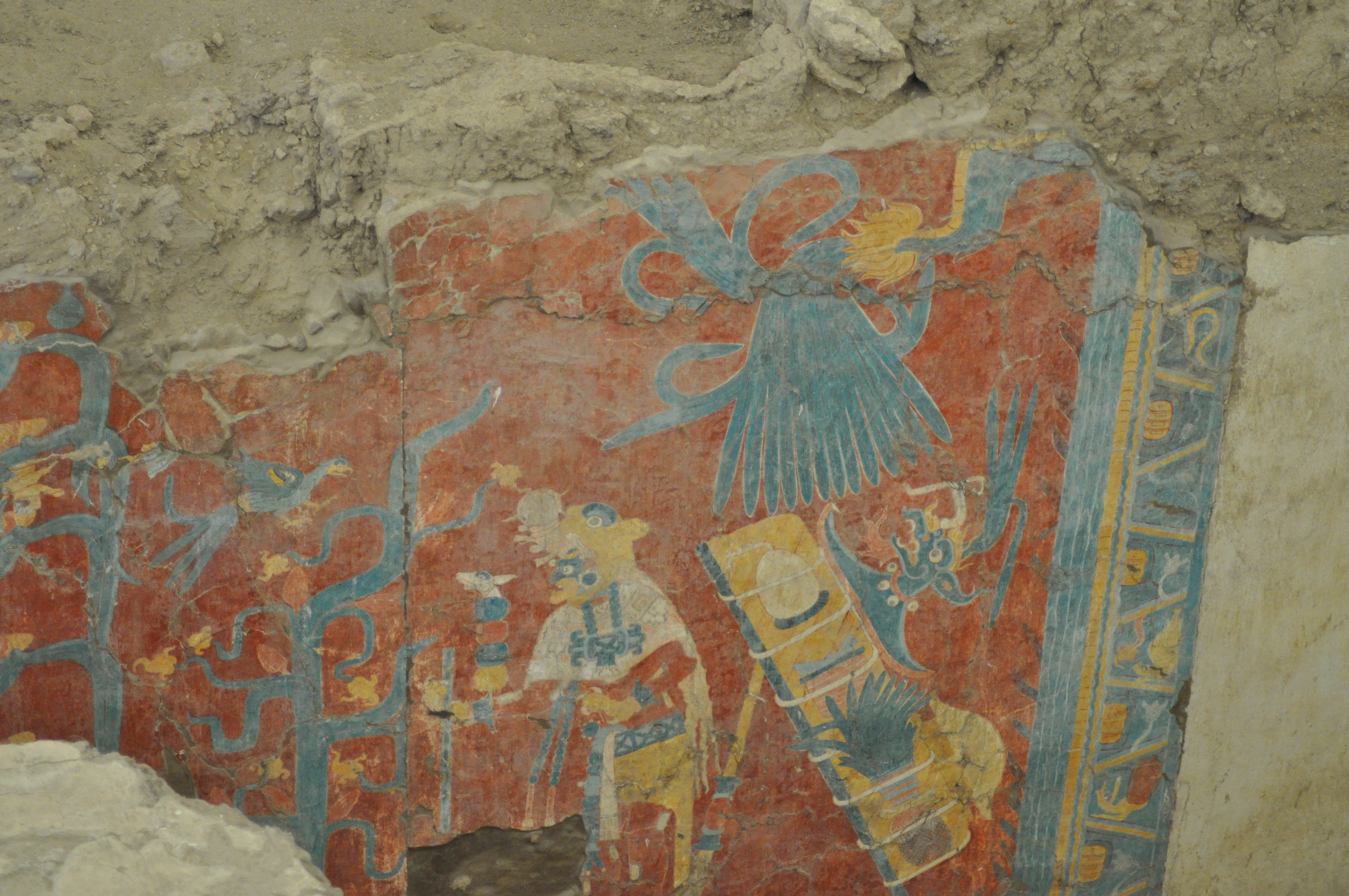 Cacaxtla